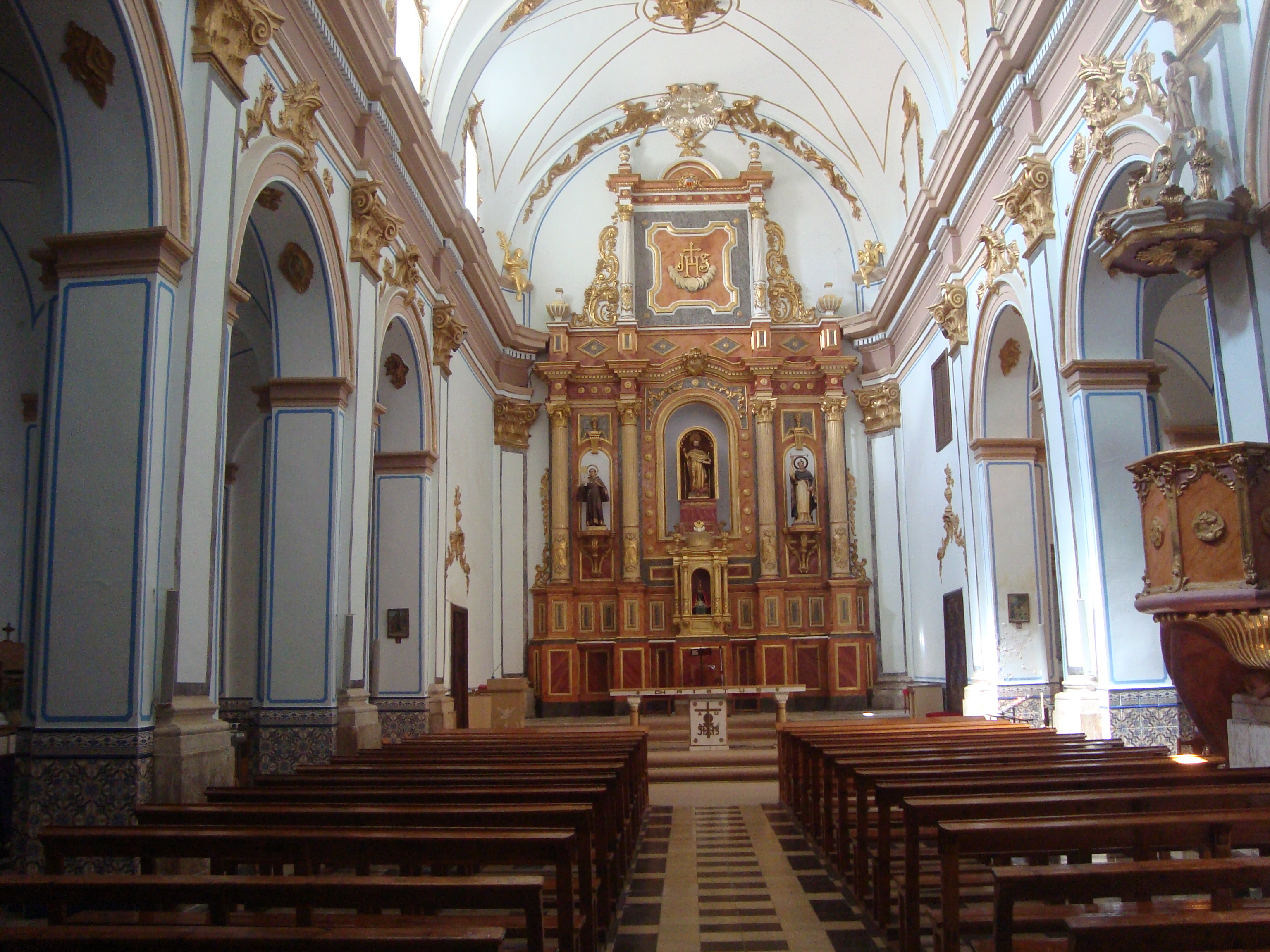 Església parroquial de Sant Bartomeu (la Serra d'en Galceran) 05.105-001.